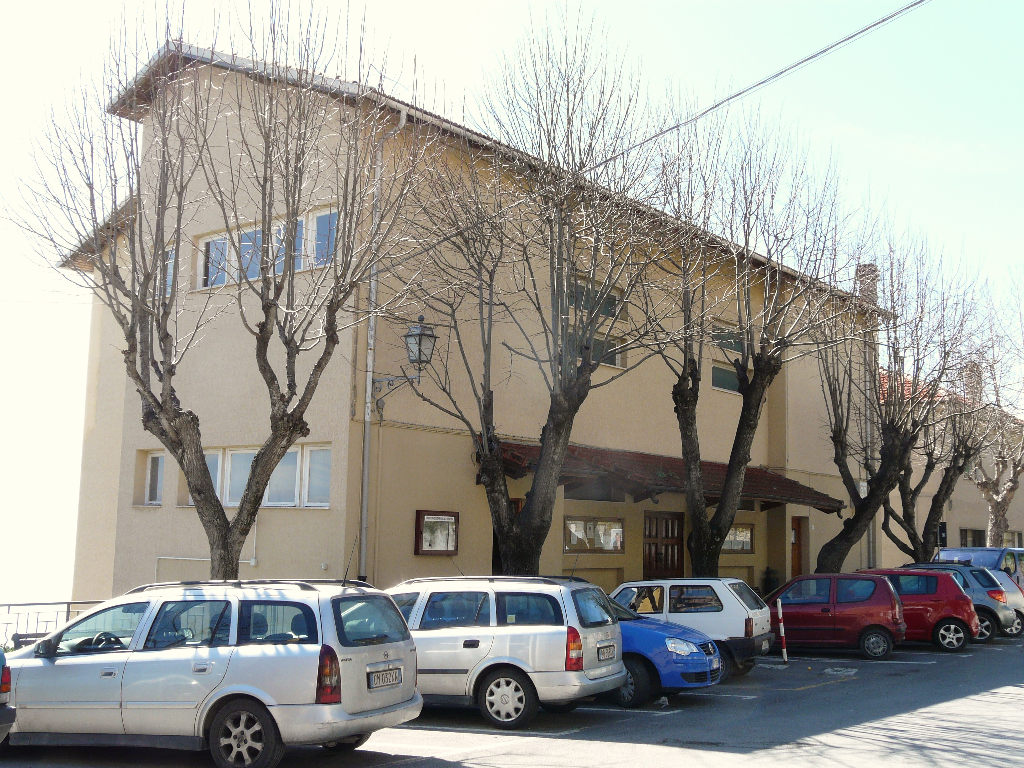 Municipio, Costarainera, Liguria, Italia